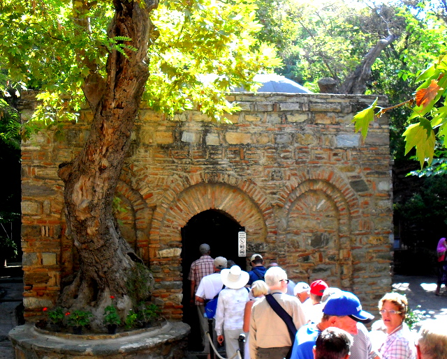 Turcja, Efez, Dom Marii Dziewicy